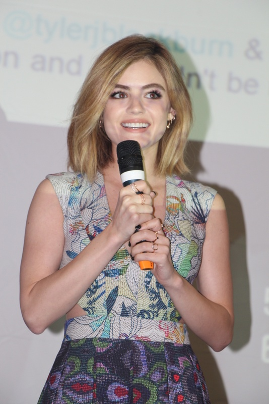 Lucy Hale-003